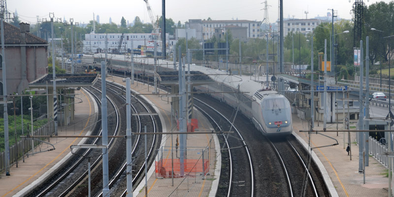 fs